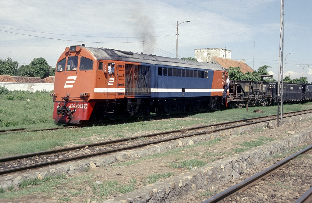 PTKACC200 (200 26 A)